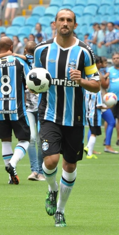 Hernan Barcos atuando pelo Grêmio em partida contra a União Frederiquense pelo Campeonato Gaúcho de 2015.